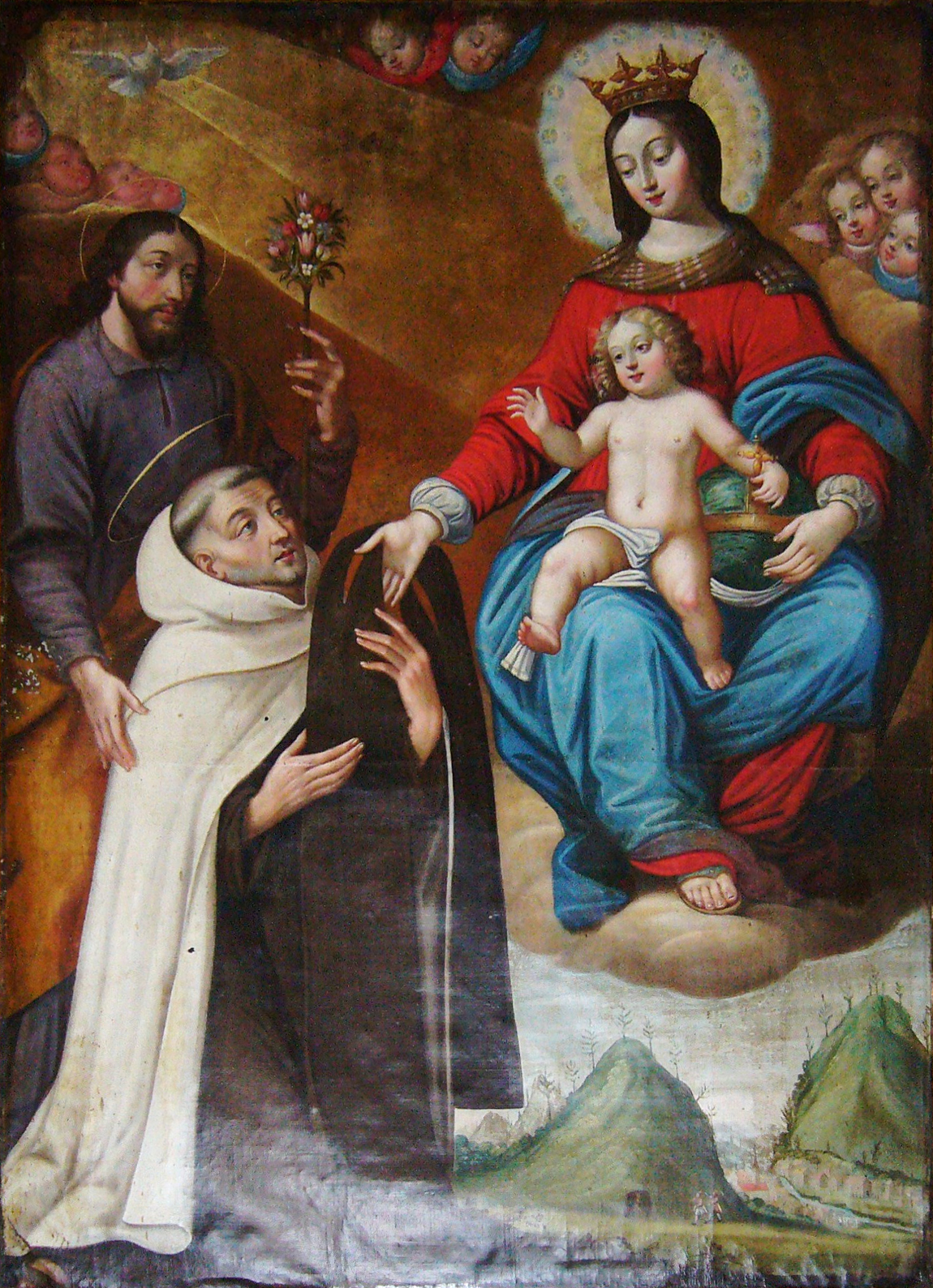 Remise du scapulaire à St Simon Stock, tableau baroque ( fin 17e - début 18e), MH classé